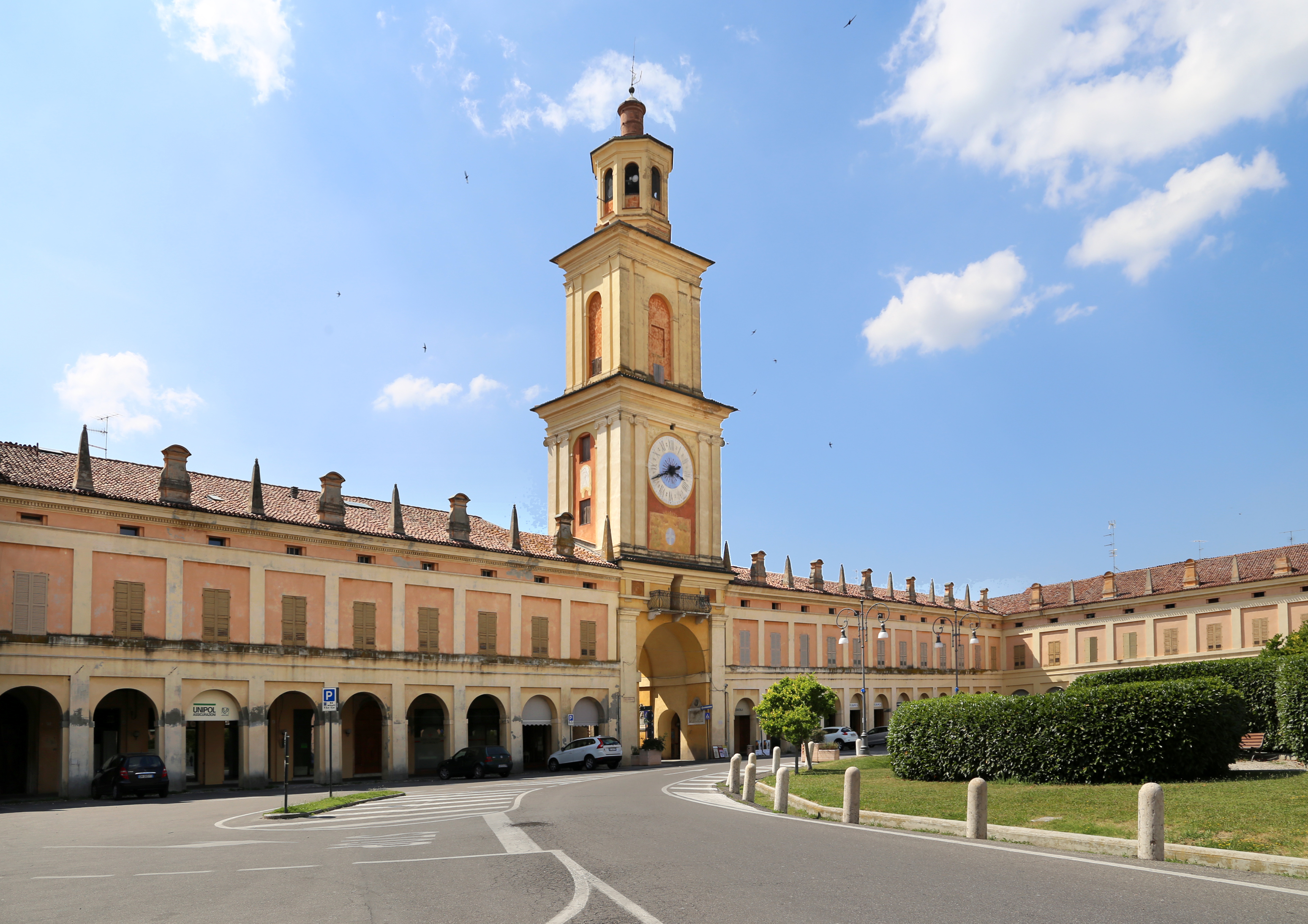 piazza Bentivoglio This is a photo of a monument which is part of cultural heritage of Italy.